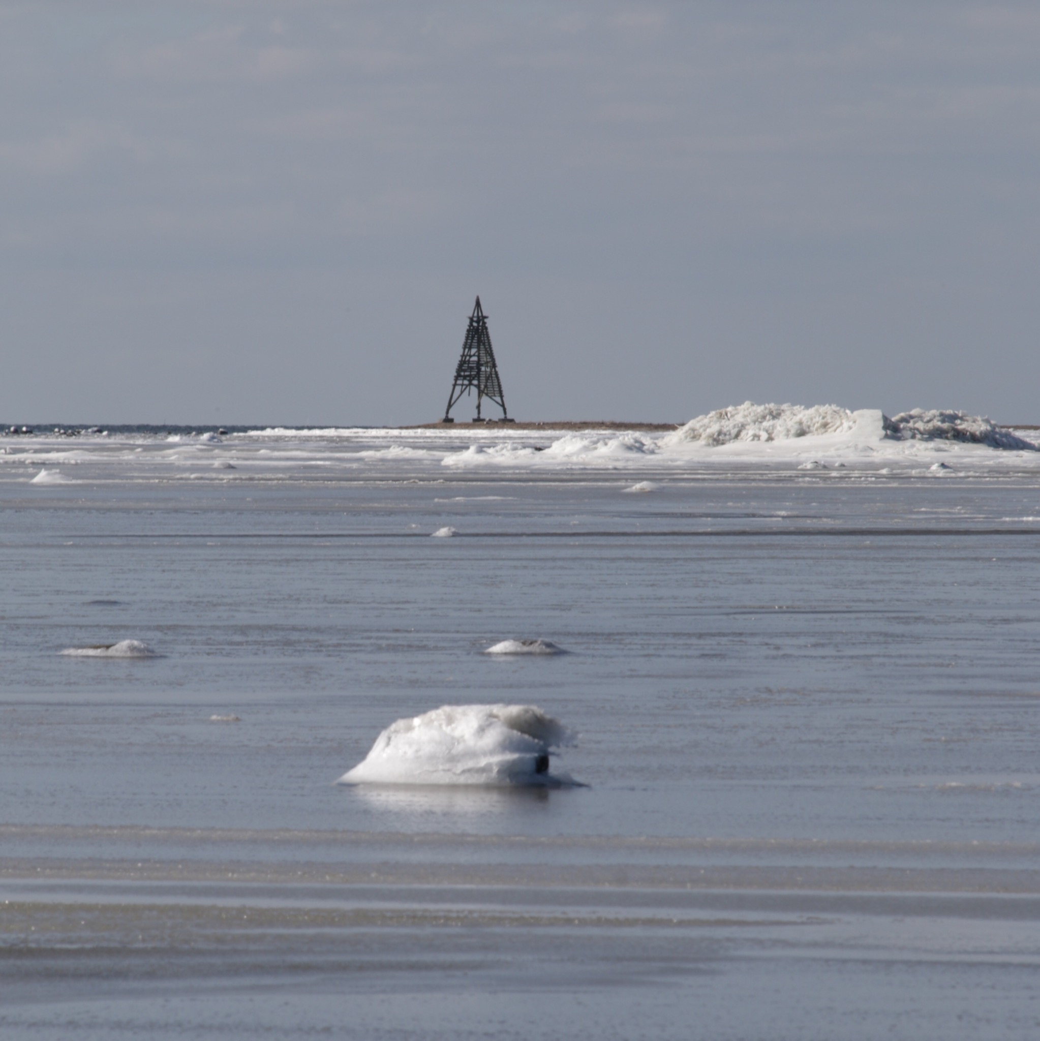 Sjömärke på Eskilstorps holmar